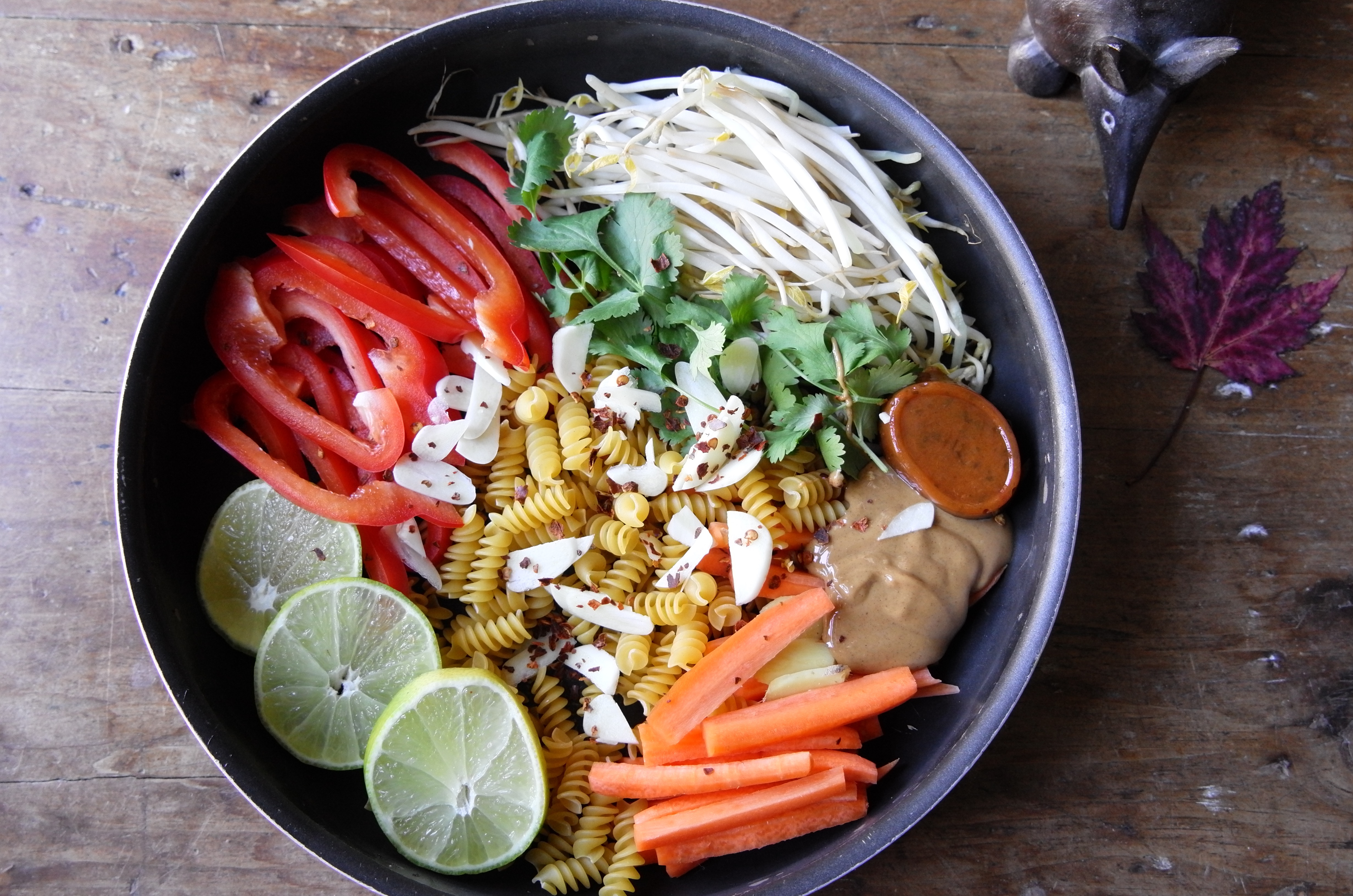 Avant cuisson, mettre tout les ingrédient dans la casserole